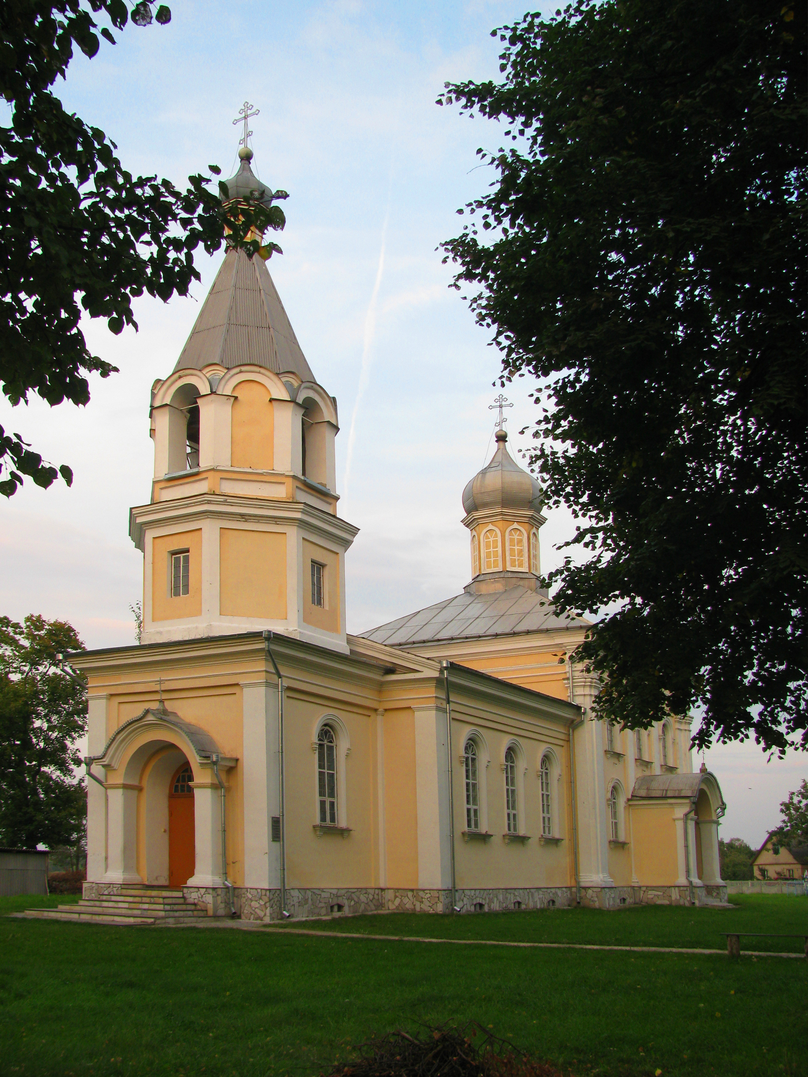 Беларуская (тарашкевіца): Усьпенская царква. в. Сялец This is a photo of Belarusian heritage monument. Reference number: 113Г000156 ( WLM)